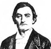 Imagen del ultimo Dalmato italiano que hablaba el original idioma dalmato. Tuone Udaina (en italiano Antonio Udina) (1823—1898) y esta era su imagen segun el hijo, publicada en articulo de Matteo Giulio Bartoli sobre su libro "Das Dalmatische" de 1906.